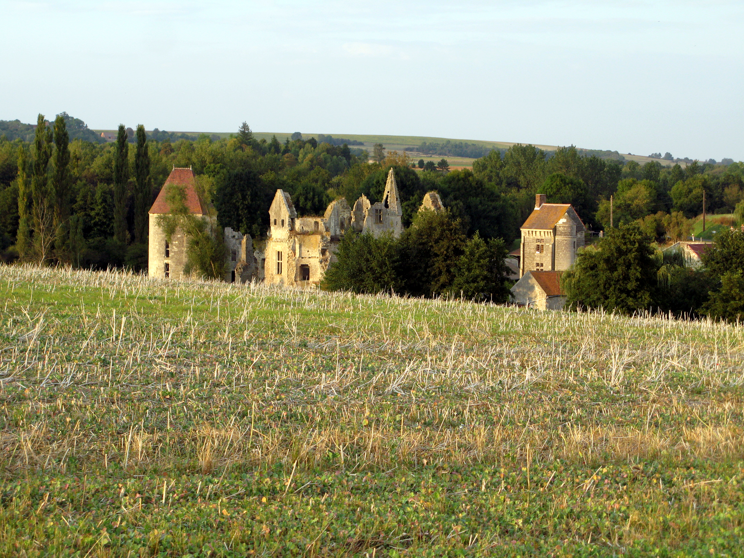 Armentières-sur-Ourcq (Aisne, France) - Vestiges du château.